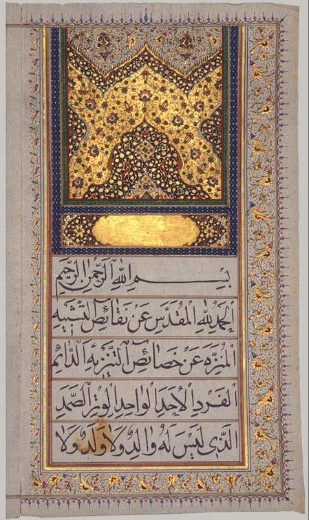 Islamic marriage contract